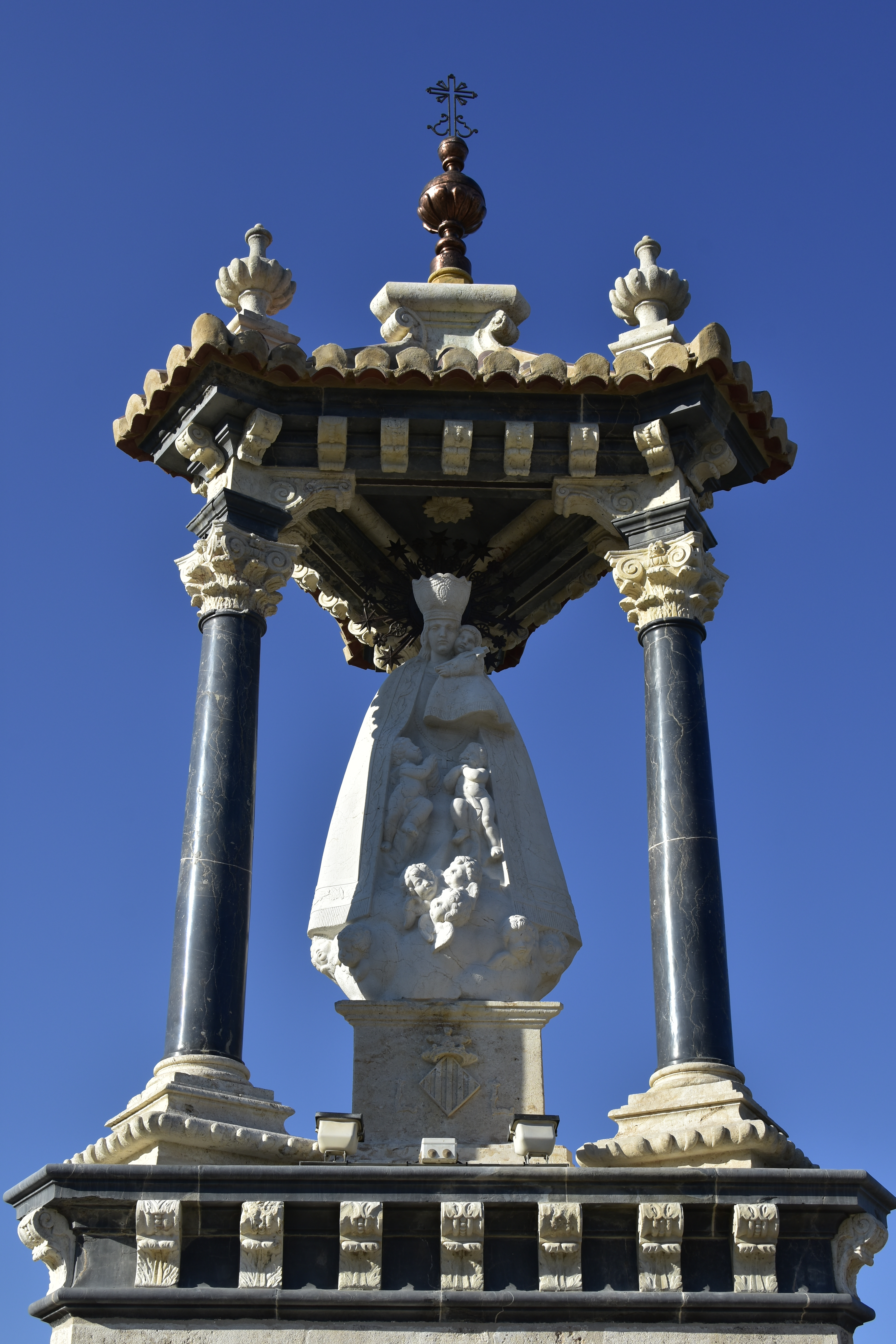 Templet de la Mare de Déu dels Desemparats al Pont de la Mar de València després de la neteja acabada en setembre de 2016.